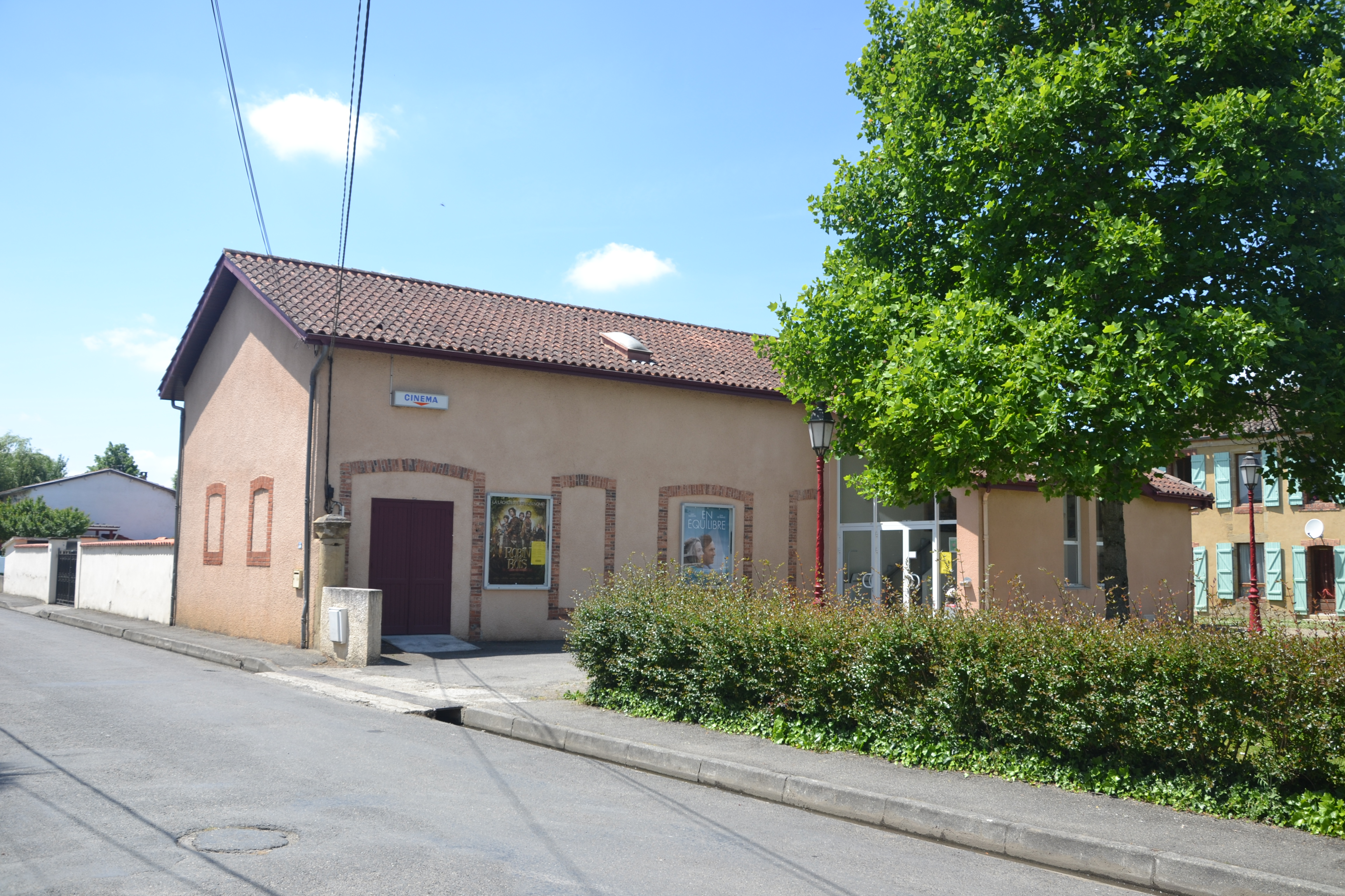 Cinéma de Plaisance (Gers, France).